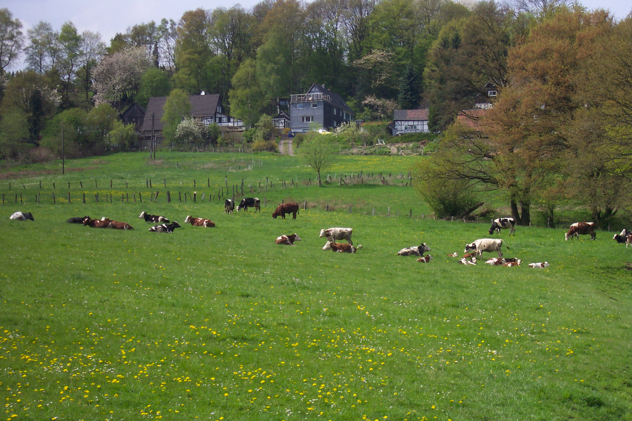 an der Fleußmühle, Solingen